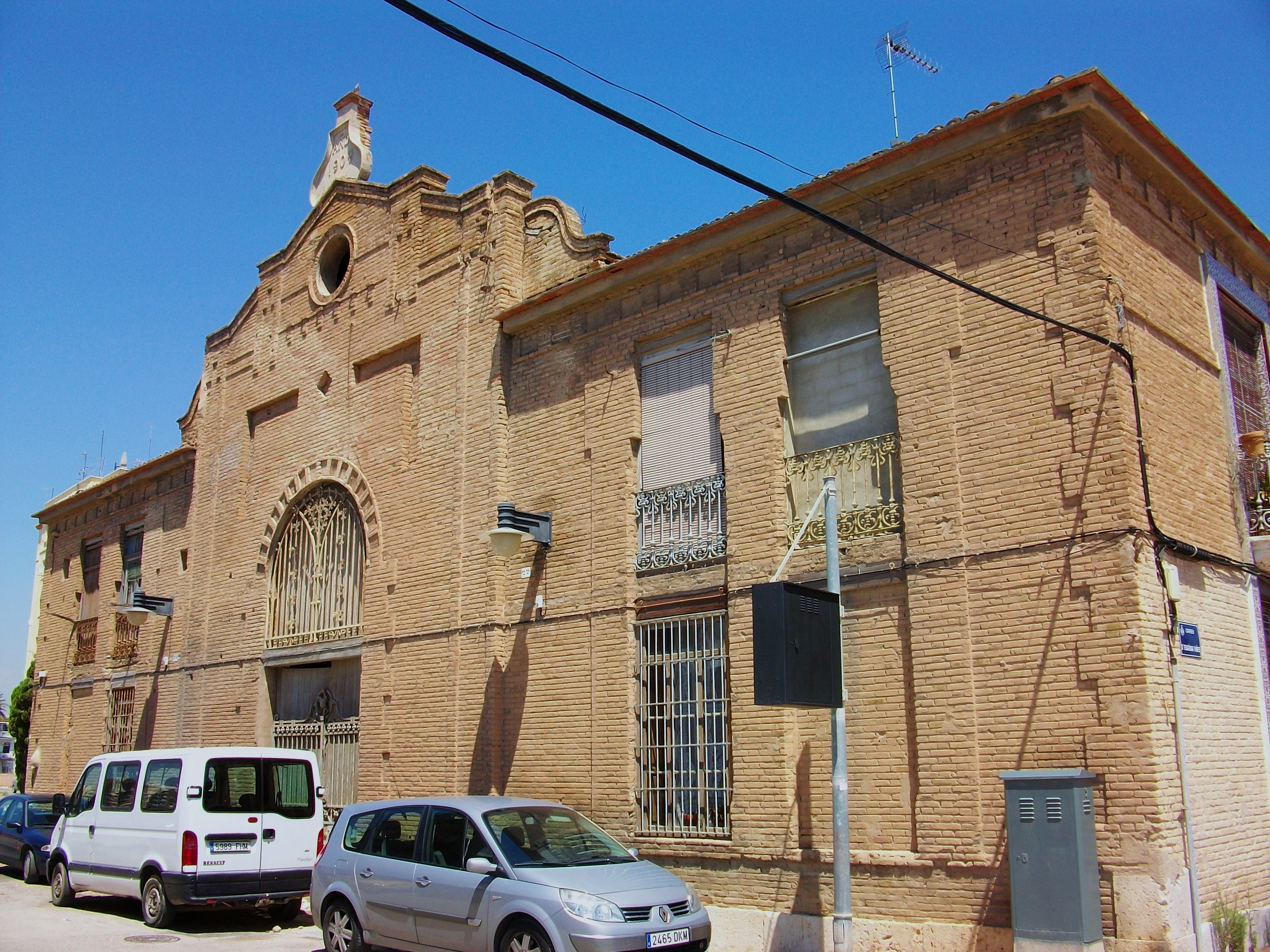 Llotja del Peix del Cabanyal.